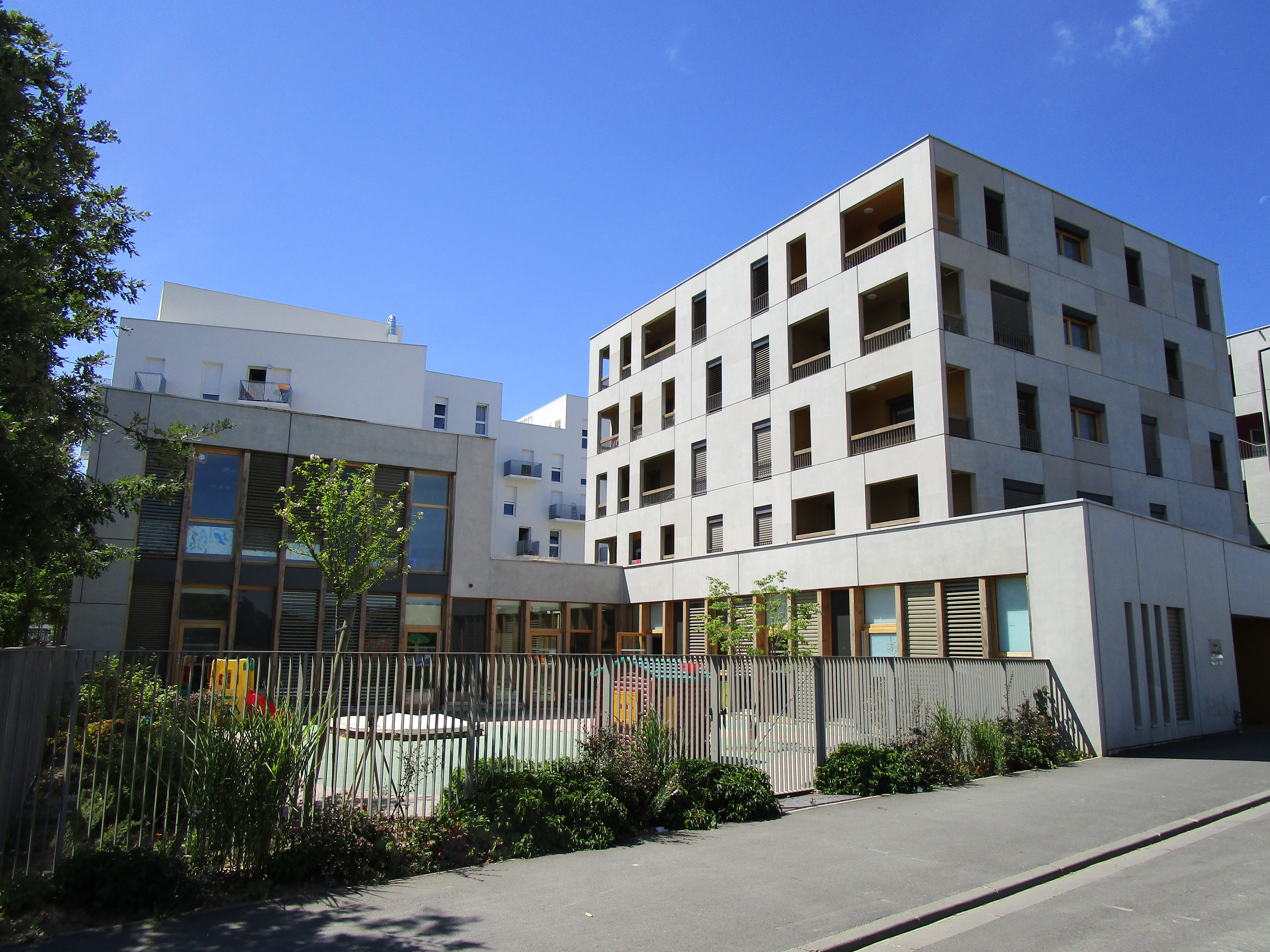 Résidence La Grenouillère située rue du Père Goriot, comprenant des logements sociaux et un espace pour la petite enfance, au sein du quartier Monconseil, à Tours Nord.